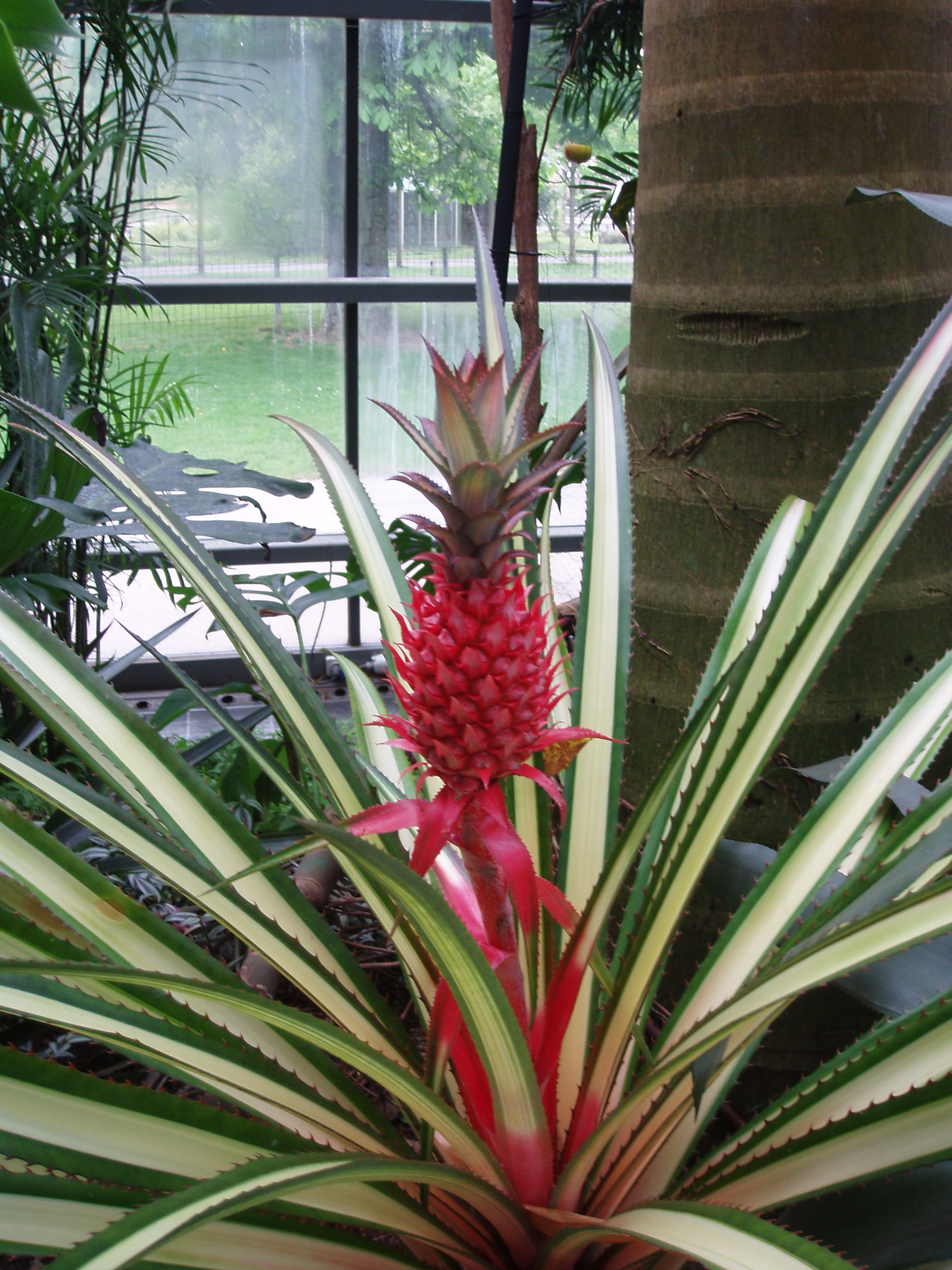 in der Wilhelma